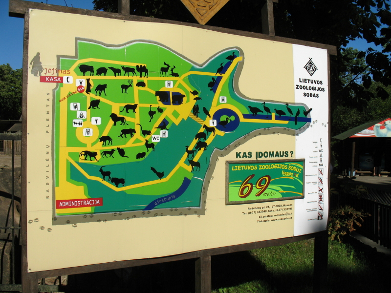 Lietuvos zoologijos sodas, Kaunas.